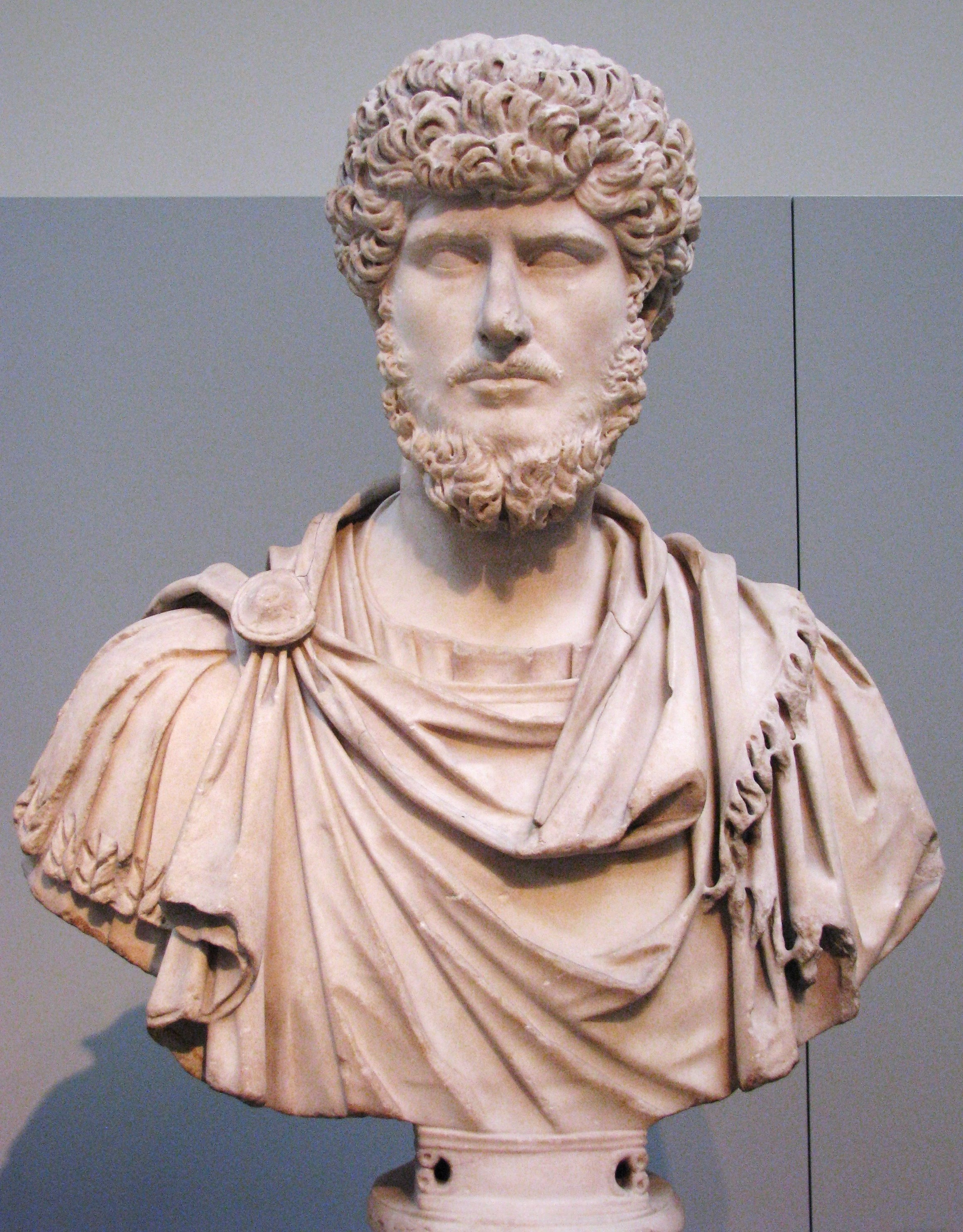 Büste des Lucius Verus. London, British Museum